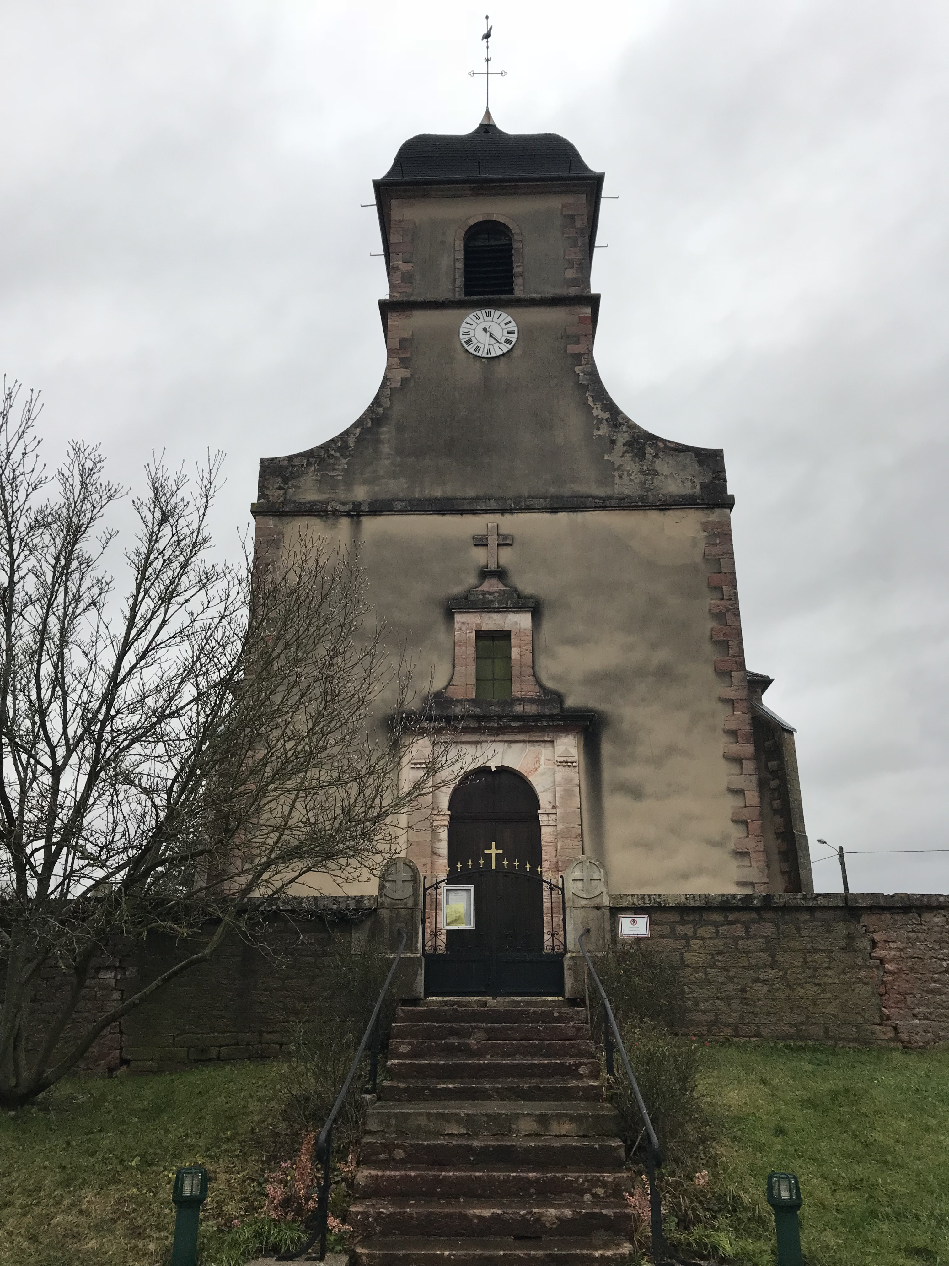 Billey (Côte-d'Or) en janvier 2018.